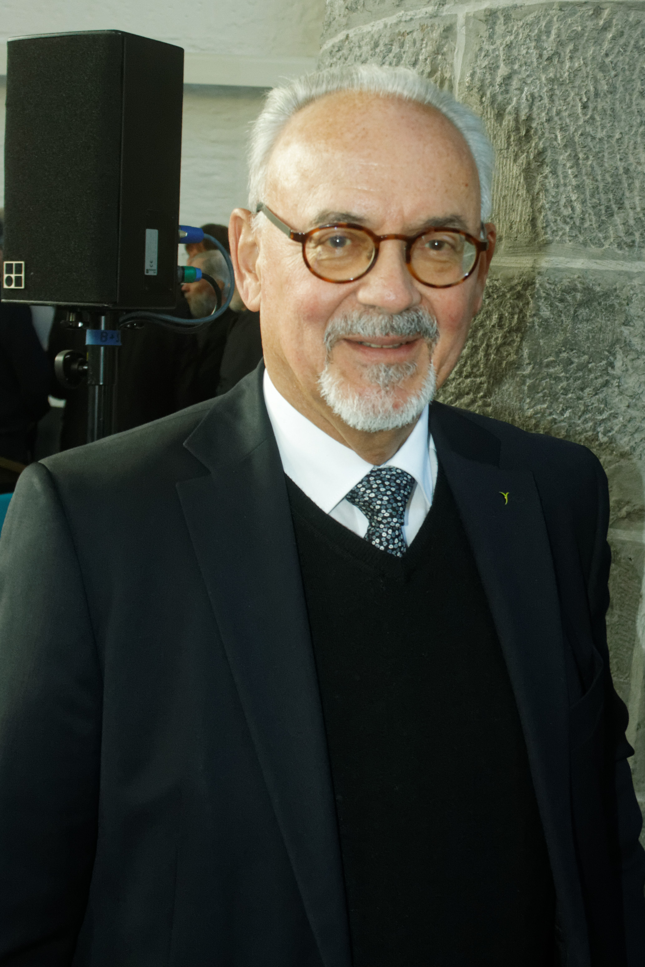 Helmut Etschenberg bei der Gedenkveranstaltung zum Volkstrauertag 2018 in Aachen